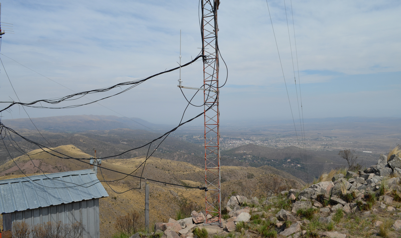 Torre de telecomunicaciones, Cerro La Rosilla, Los Cocos, Córdoba, Argentina